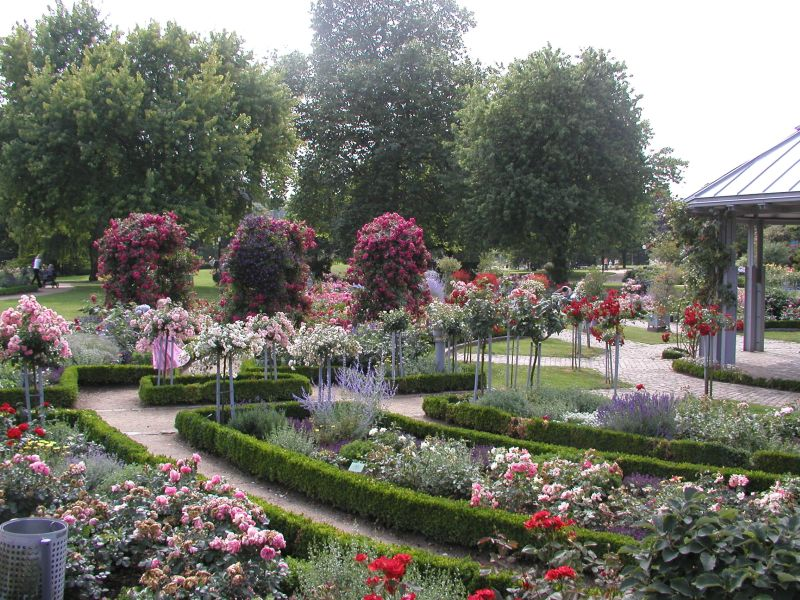 Rosengarten im Park Planten un Blomen, Hamburg.